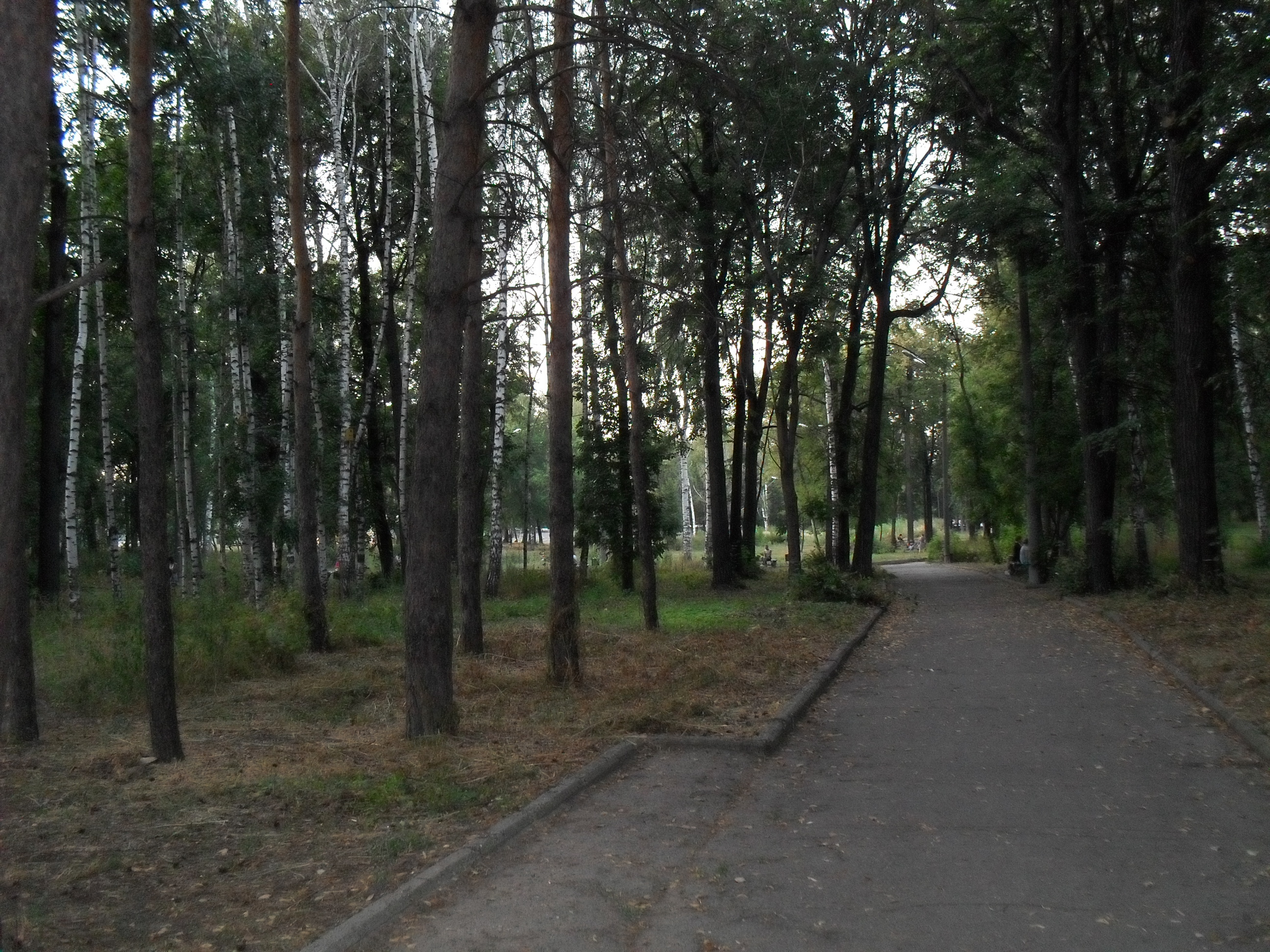 Лесопарковая зона парка "Сосновая роща" (Парк ДК "Химиков"), что расположен в Казани на улице Декабристов